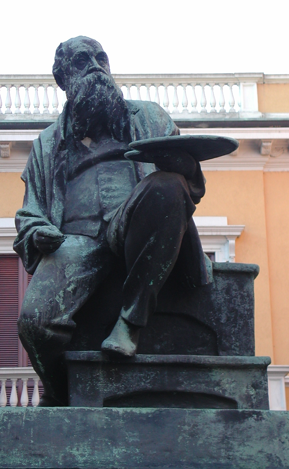 Statua di Mosè Bianchi (Monza, 13 ottobre 1840 – Monza, 15 marzo 1904) un pittore italiano. Source: photo uploaded by User:RicciSpeziari. Photographer: Riccardo Speziari